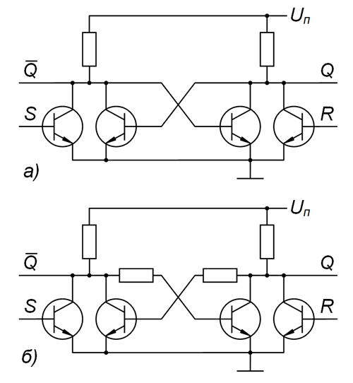 RS-триггер на дискретных элементах